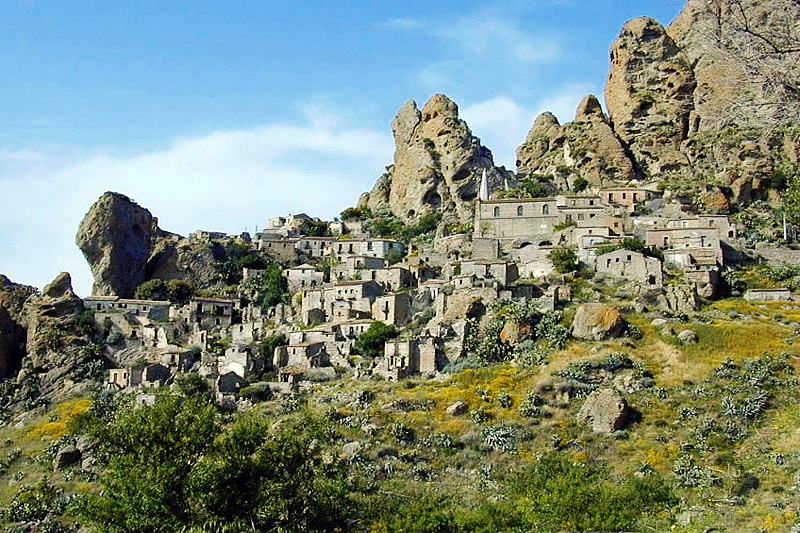 Pentedattilo, Reggio Calabria, Italy